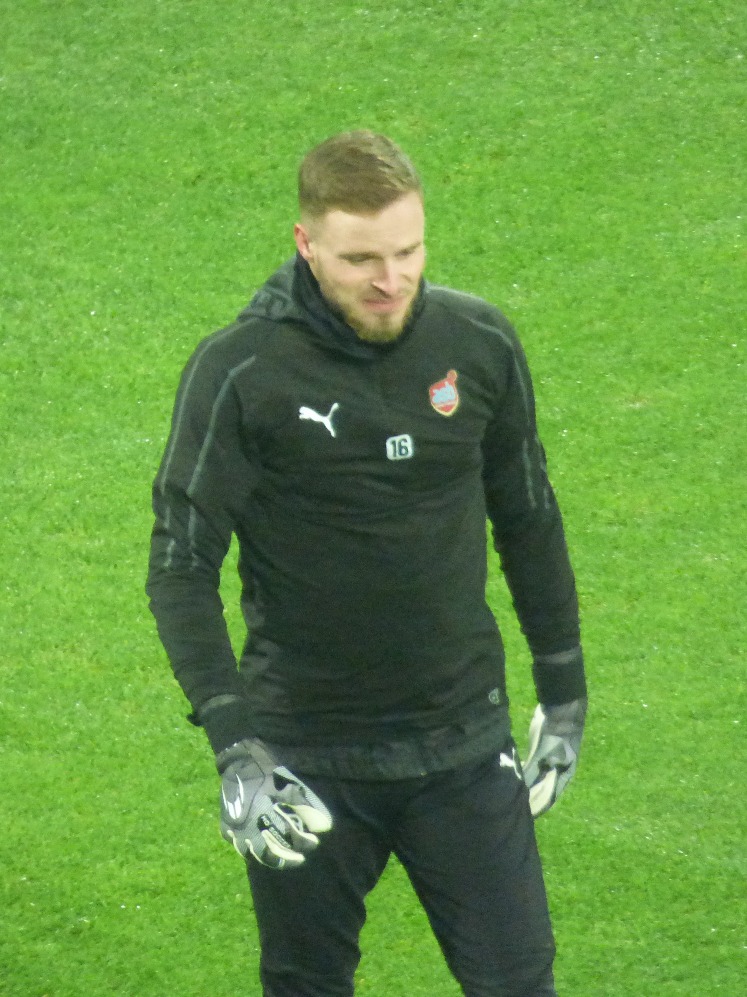 Vincent Viot avant le match RC Lens / AS Béziers, comptant pour la 23ème journée du championnat de France de football de Ligue 2 2018-2019, le 4 février 2019, au Stade Bollaert-Delelis.